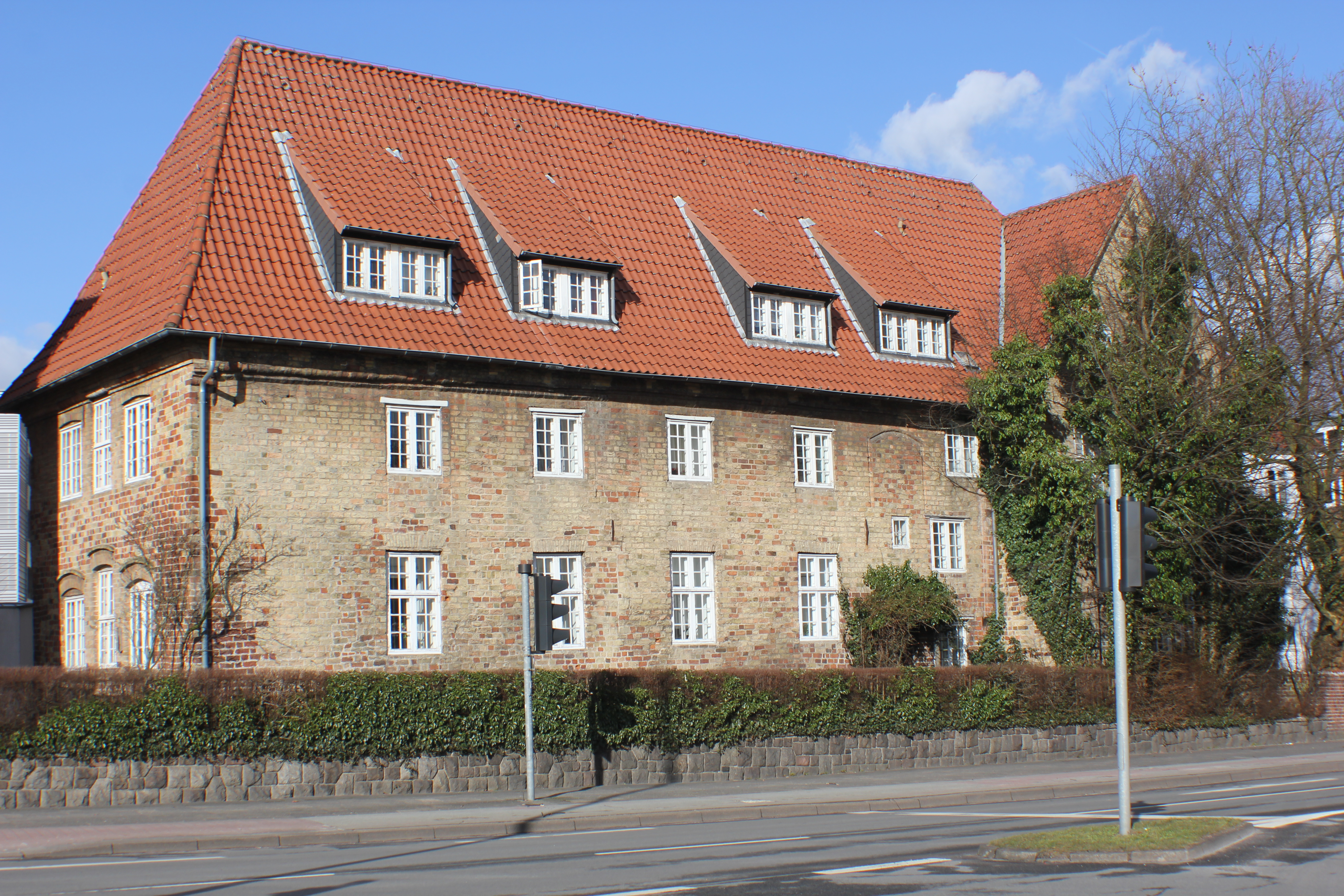 Hospital und Kloster zum Heiligen Geist, drittes Bild